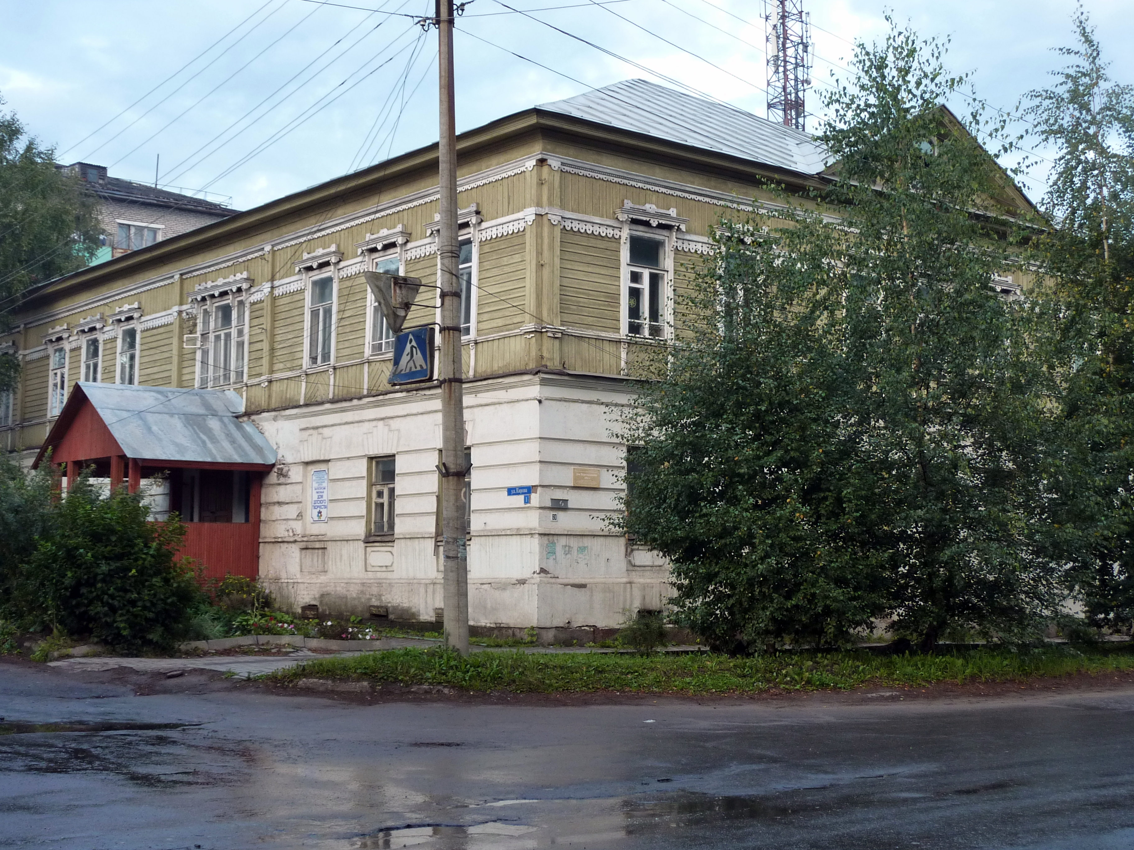 город Вытегра, дом Веретенникова (проспект Ленина, 60)